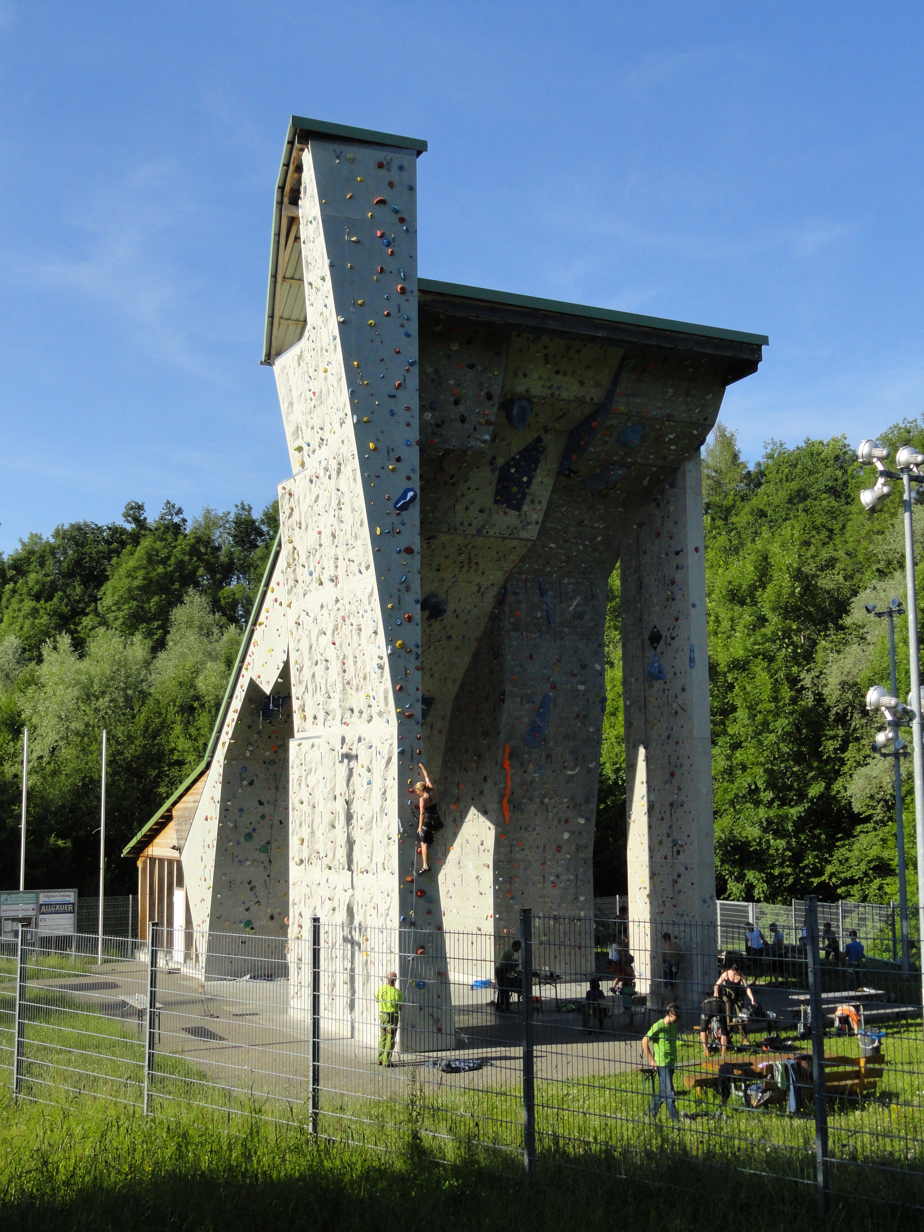 Kletteranlage im Engelhaldepark